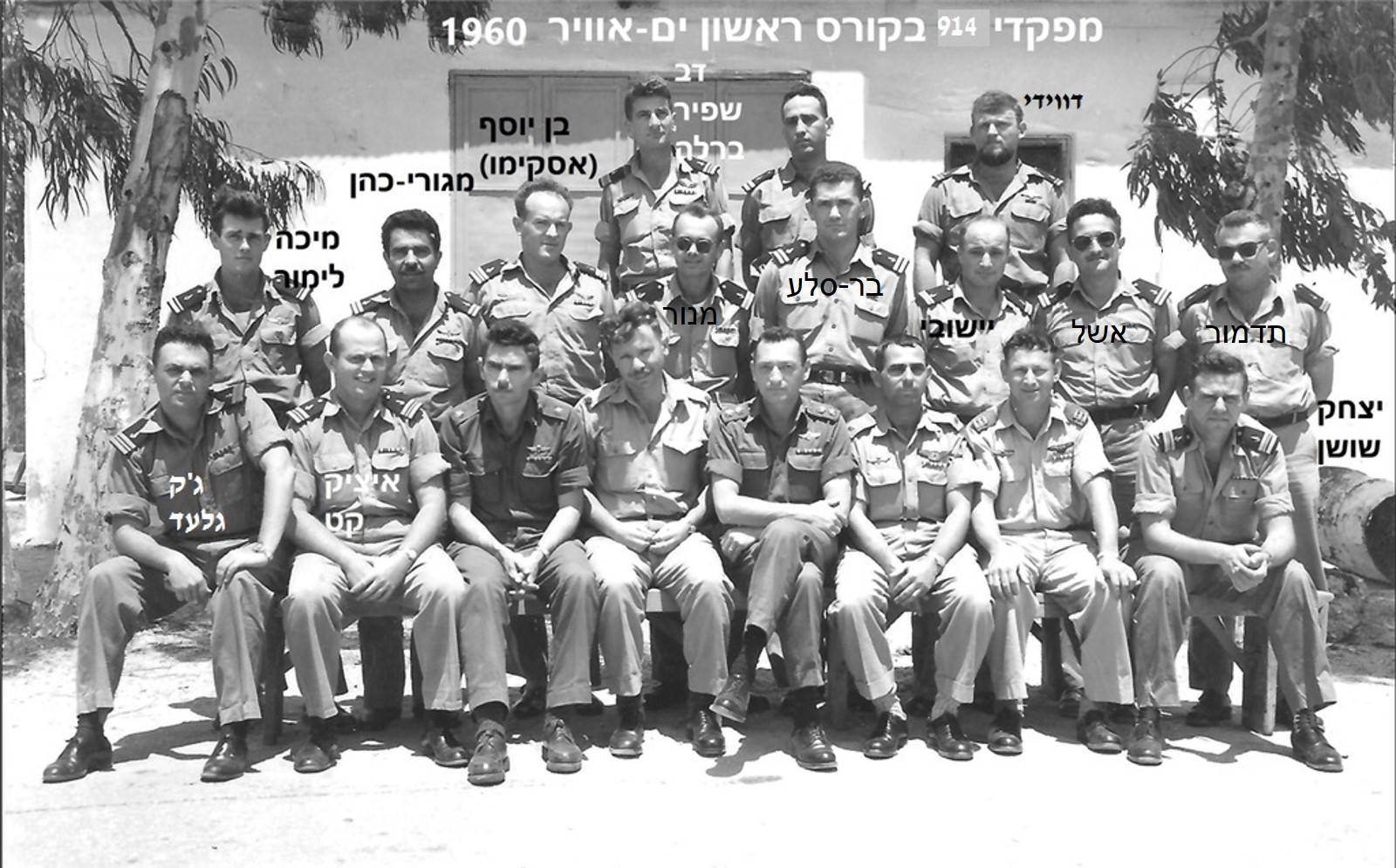 קציני פלגת הטרפדות בקורס סיוע ים אוויר, 1960